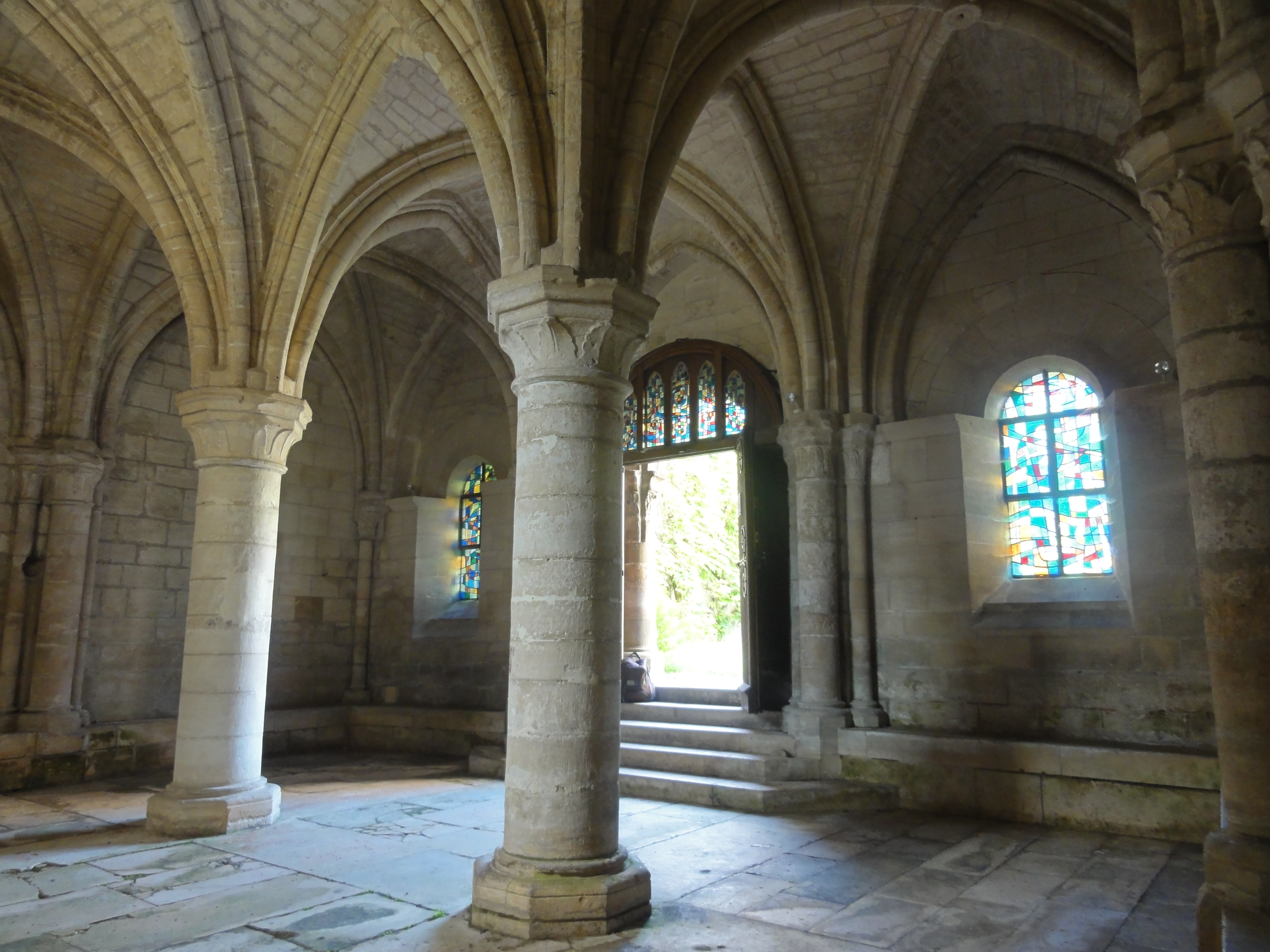 Vue diagonale vers le sud-ouest.